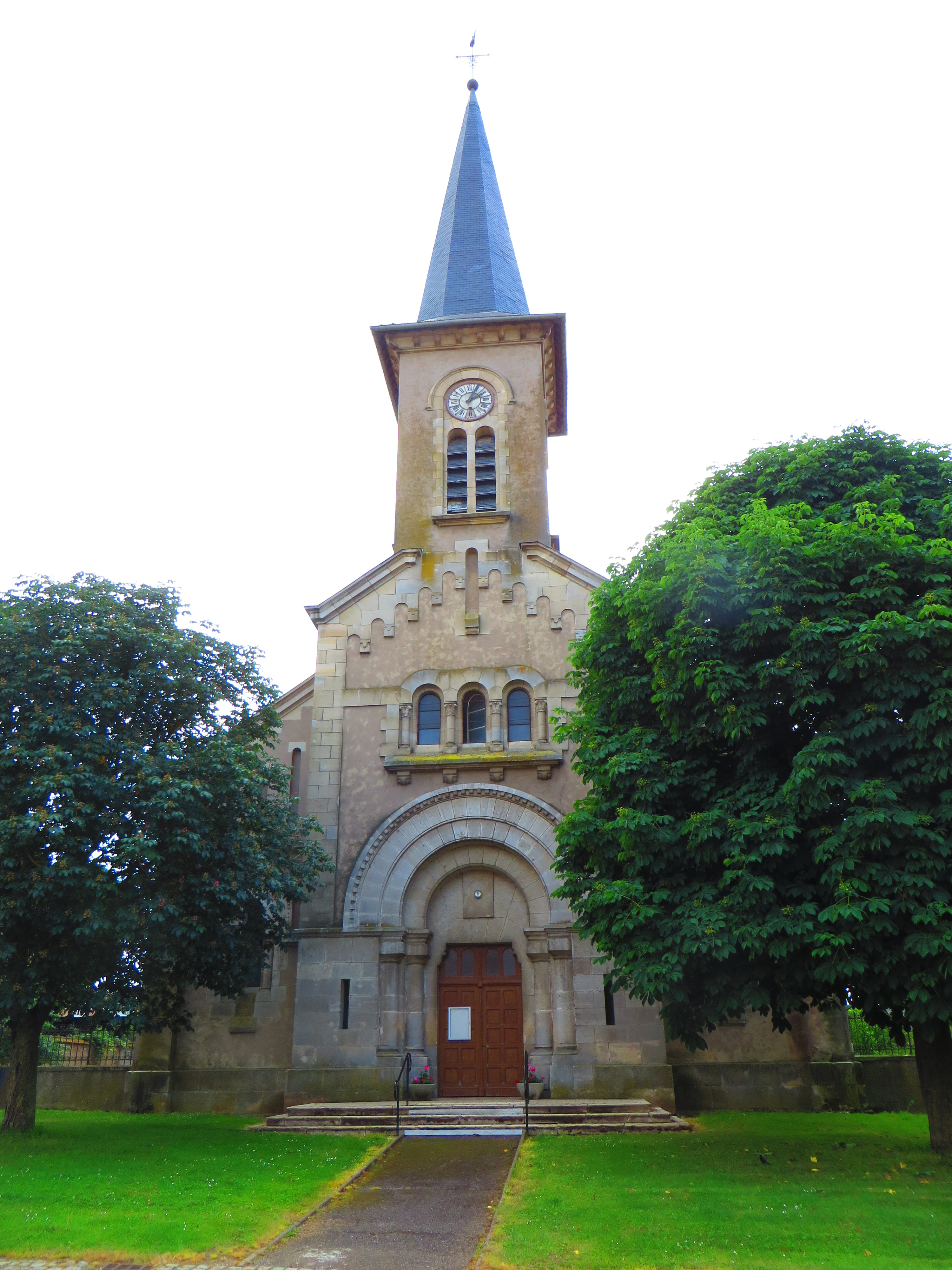 Abaucourt Église de la Nativité-de-la-Vierge